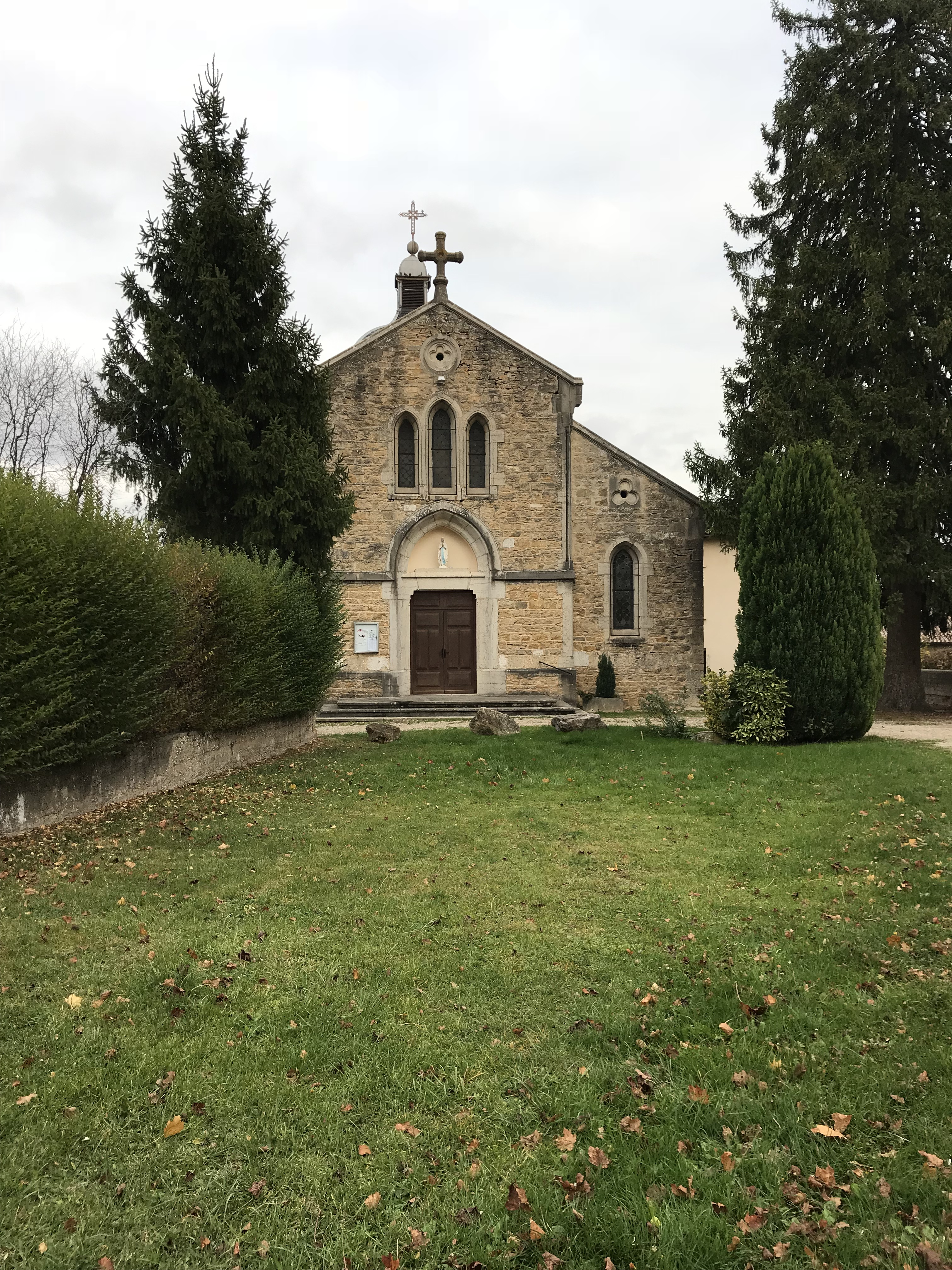 Église Saint-Laurent de Mollon en novembre 2017.